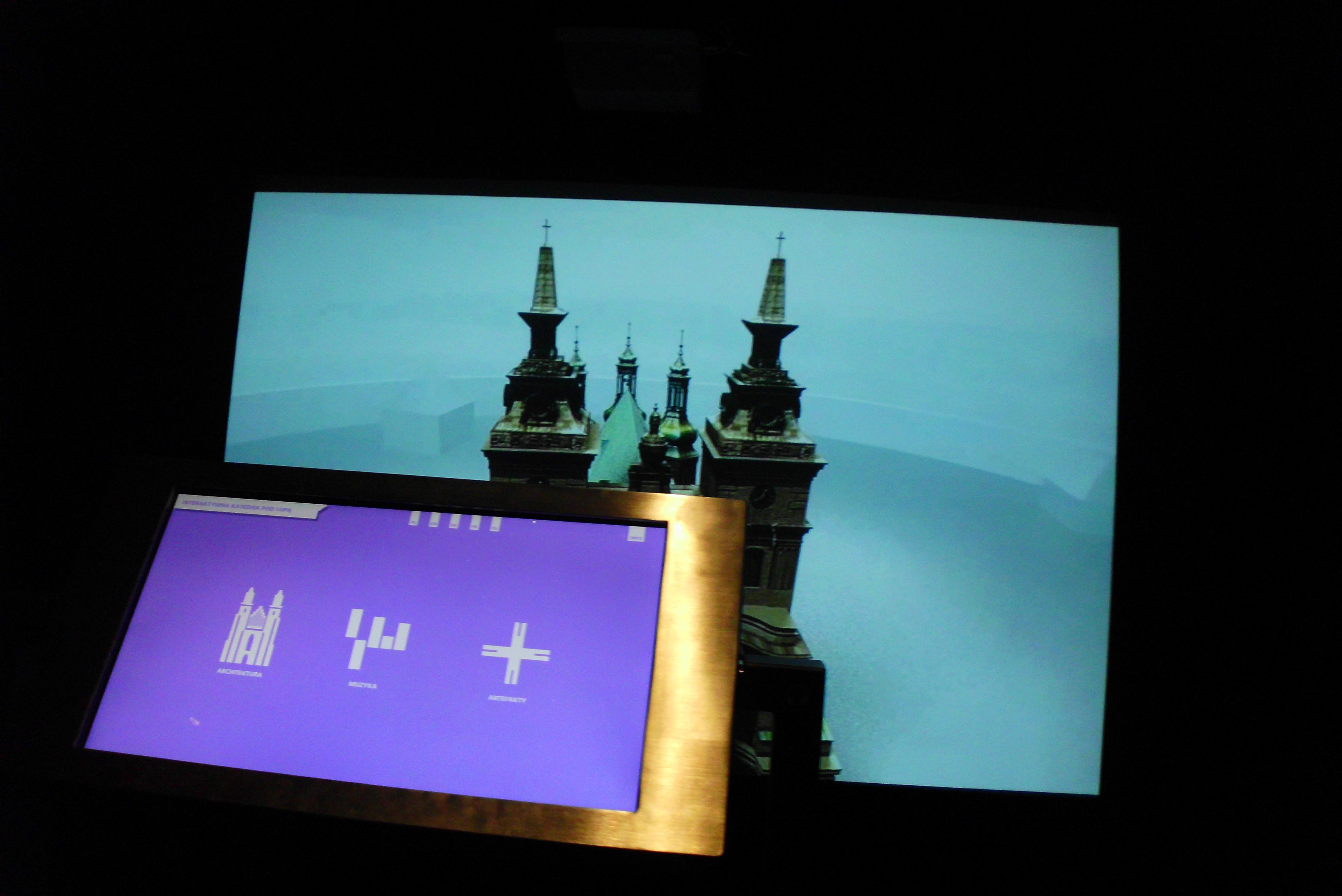 Otwarcie ICHOT "Brama Poznania" 4.05.2014